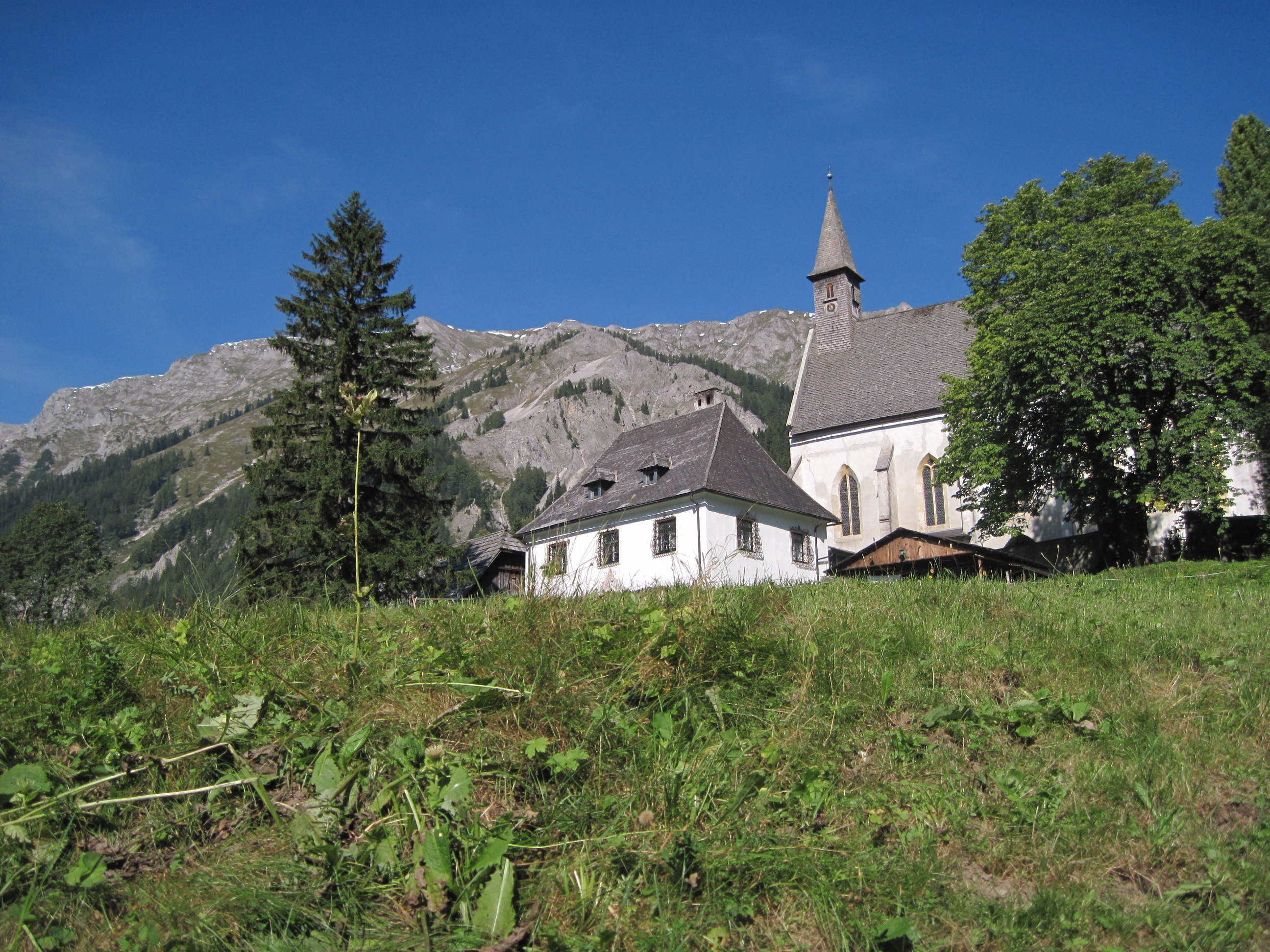 Kath. Pfarrkirche hl. Leonhard und Kirchhof. Seewiesen, Turnau. Davor der Pfarrhof.